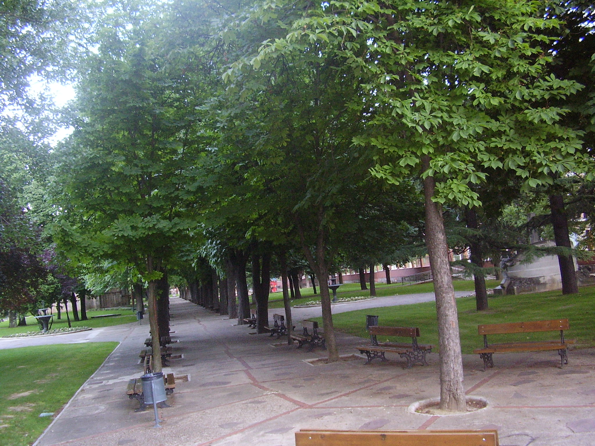 Perspective del paseo central de la Huerta de Guadián, en Palencia.